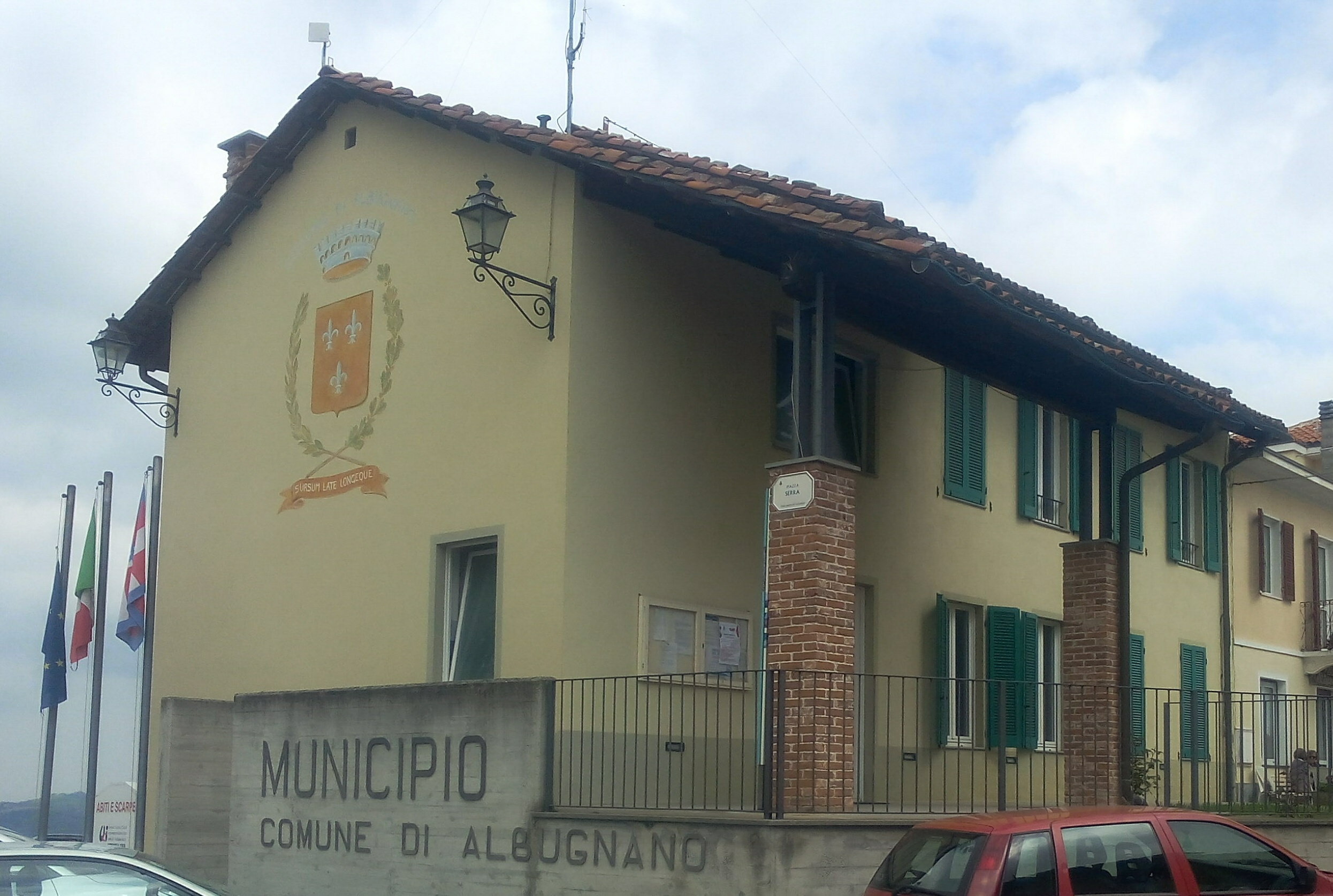 Albugnano (AT): il municipio